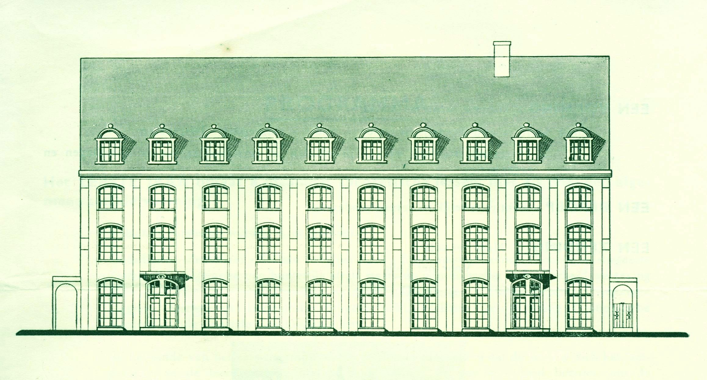 Het schoolgebouw in het centrum van Kortrijk is een aangenaam studieoord, getuigen de studentes.